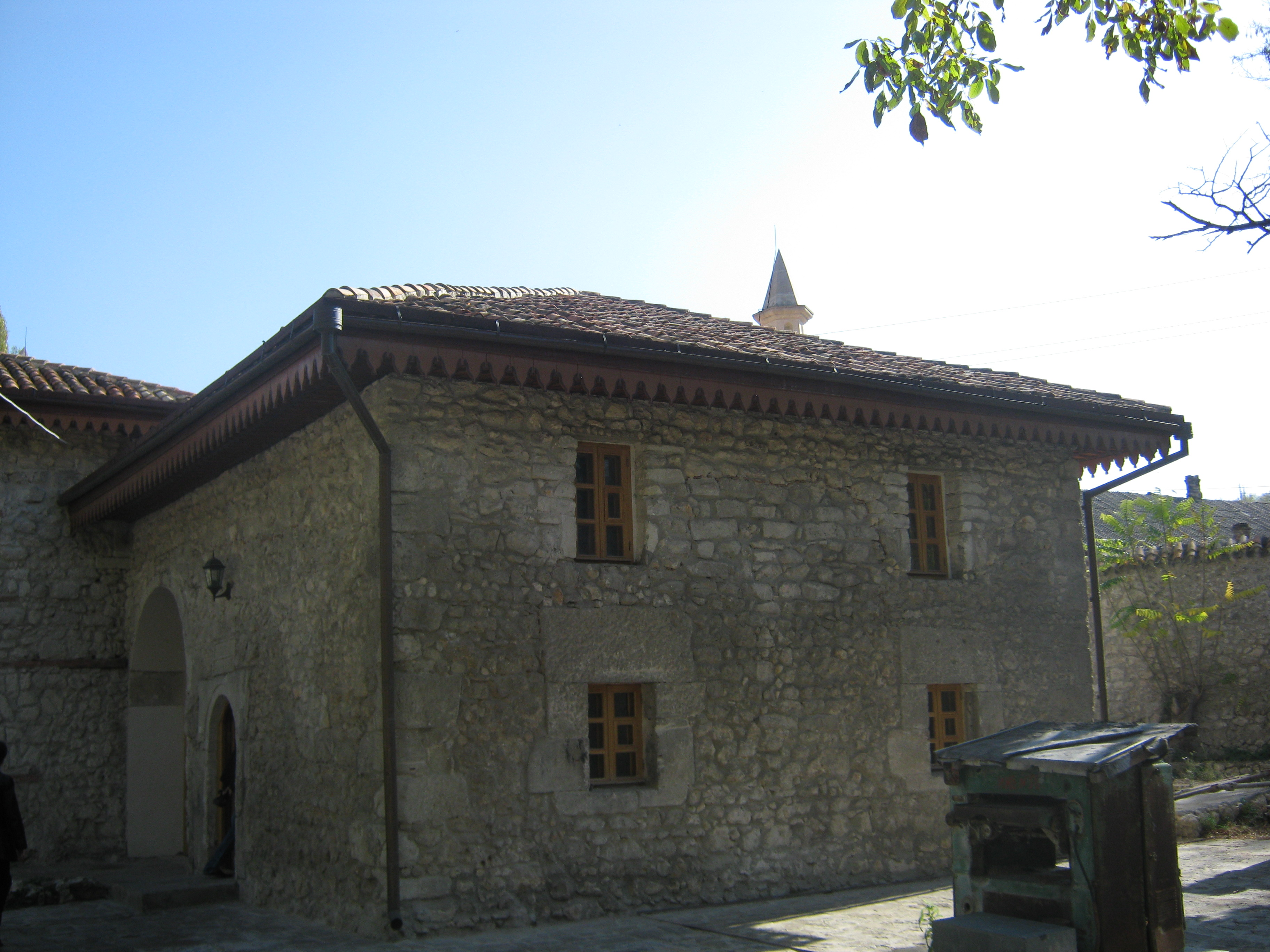 Баня Сары_Гюзель 1532 г. Бахчисарай